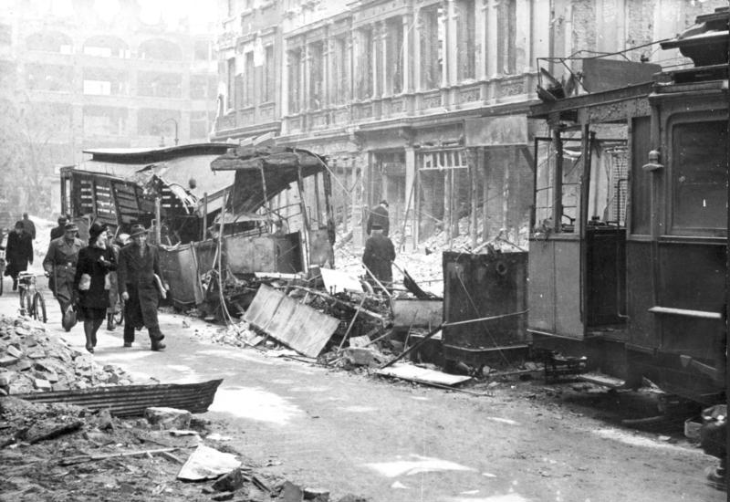 Berlin, zerstörte Straßenbahn in der Oranienstraße Scherl: ADN-ZB/Archiv II. Weltkrieg 1939-45 Nach dem alliierten Luftangriff auf Berlin am 3. Februar 1945. Neben zerstörten Straßenbahnwagen wurde in der Oranienstraße ein Weg freigelegt. (Hofmann)